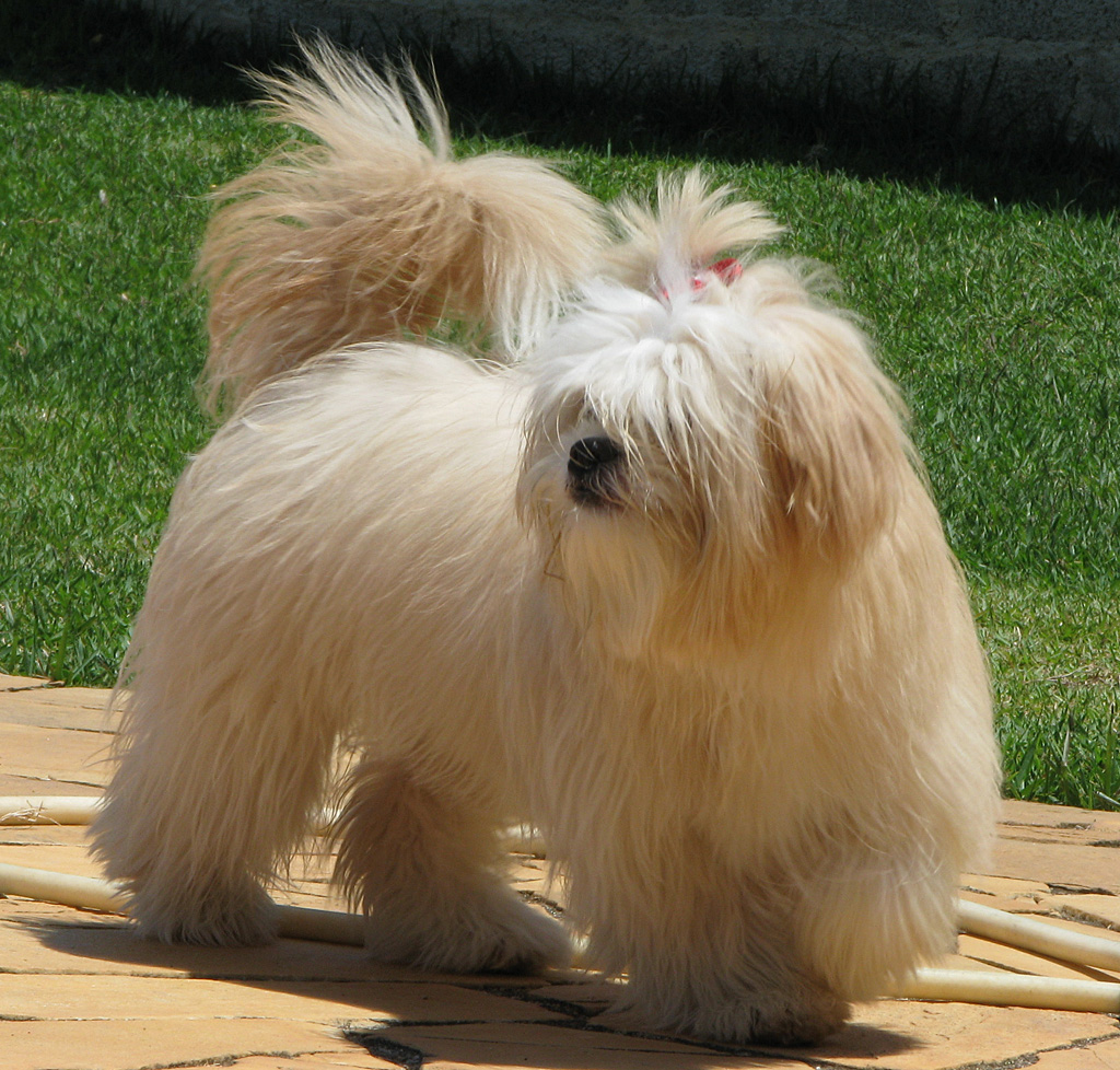 Lhasa Apso femea com 6 meses